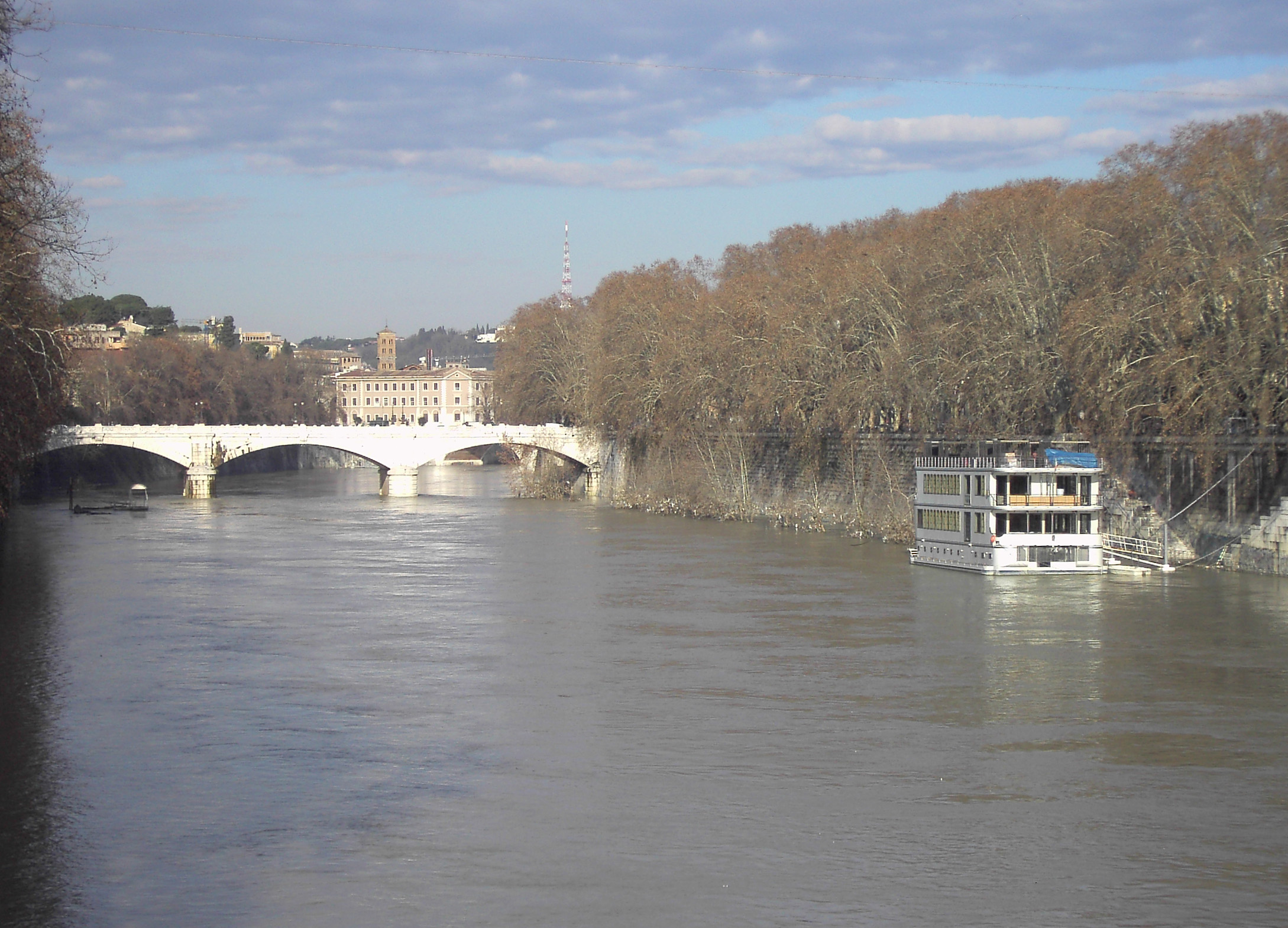 Roma, Ponte Mazzini da Ponte Sisto.